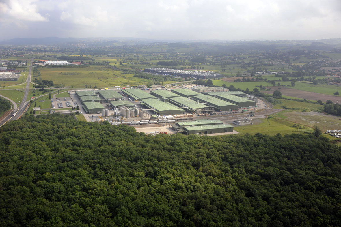 usine SNF à Andrézieux Bouthéon